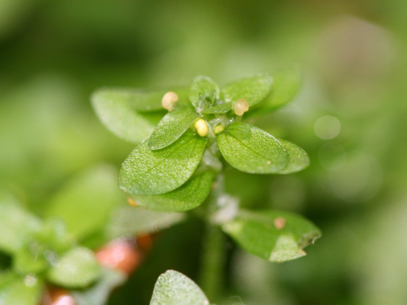 Stumpfkantiger Wasserstern (Callitriche cophocarpa), Detailaufnahme